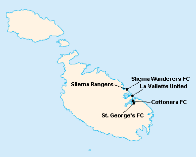 Répartition des clubs en First Division Maltaise 1929-1930.